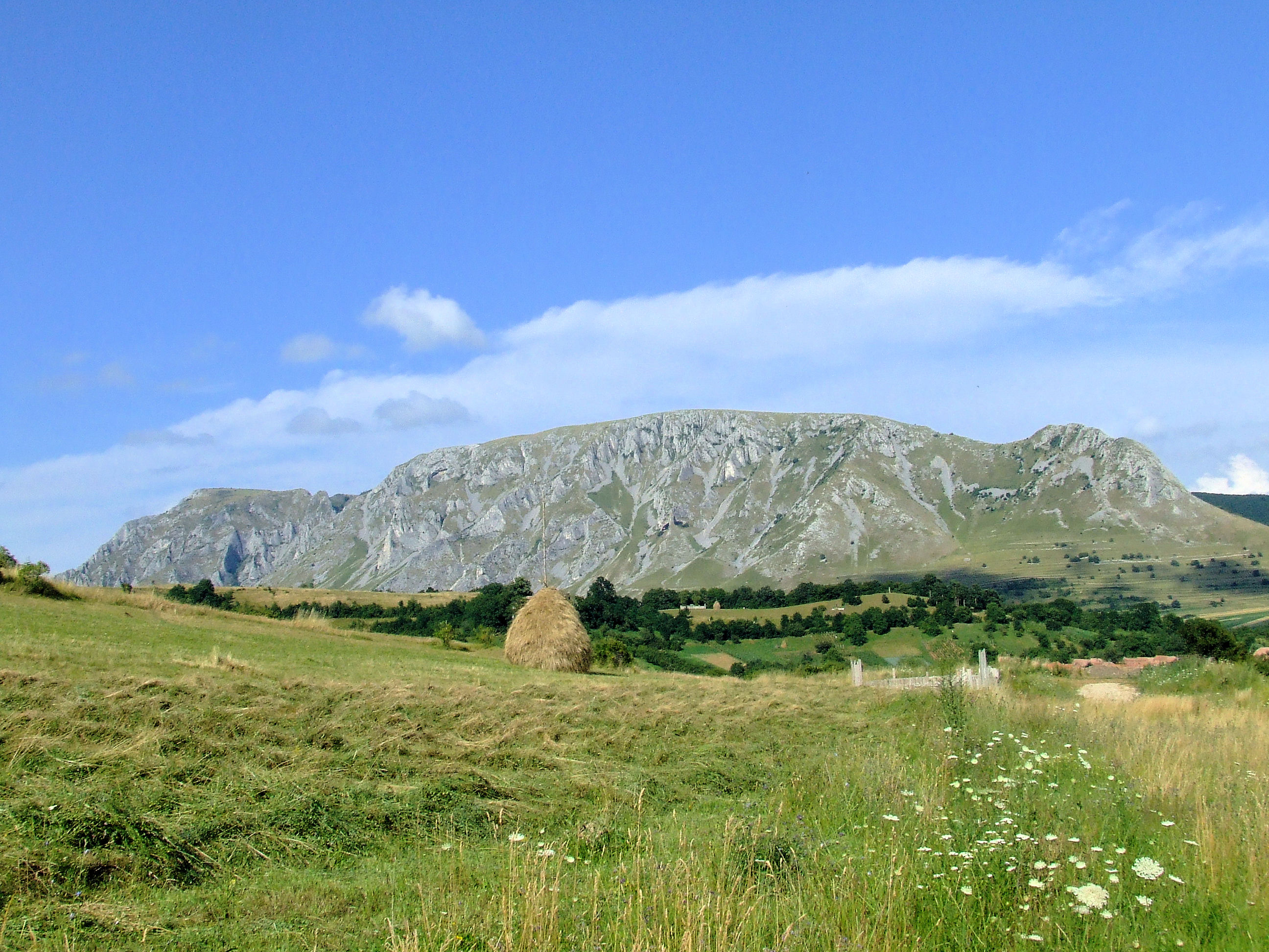 A Székelykő a torockószentgyörgyi vártól fényképezve